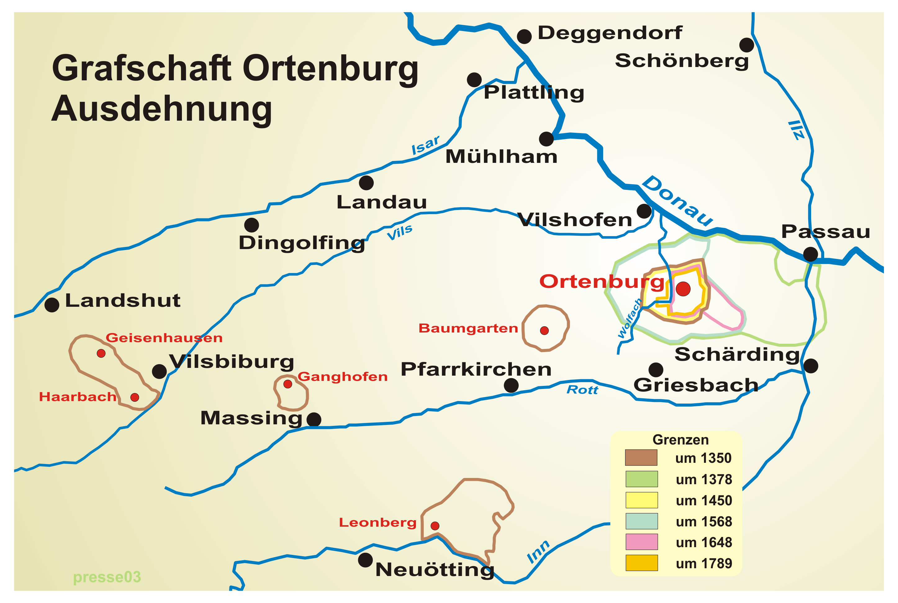 Ausdehnungen der Grafschaft Ortenburg 1350 bis 1805